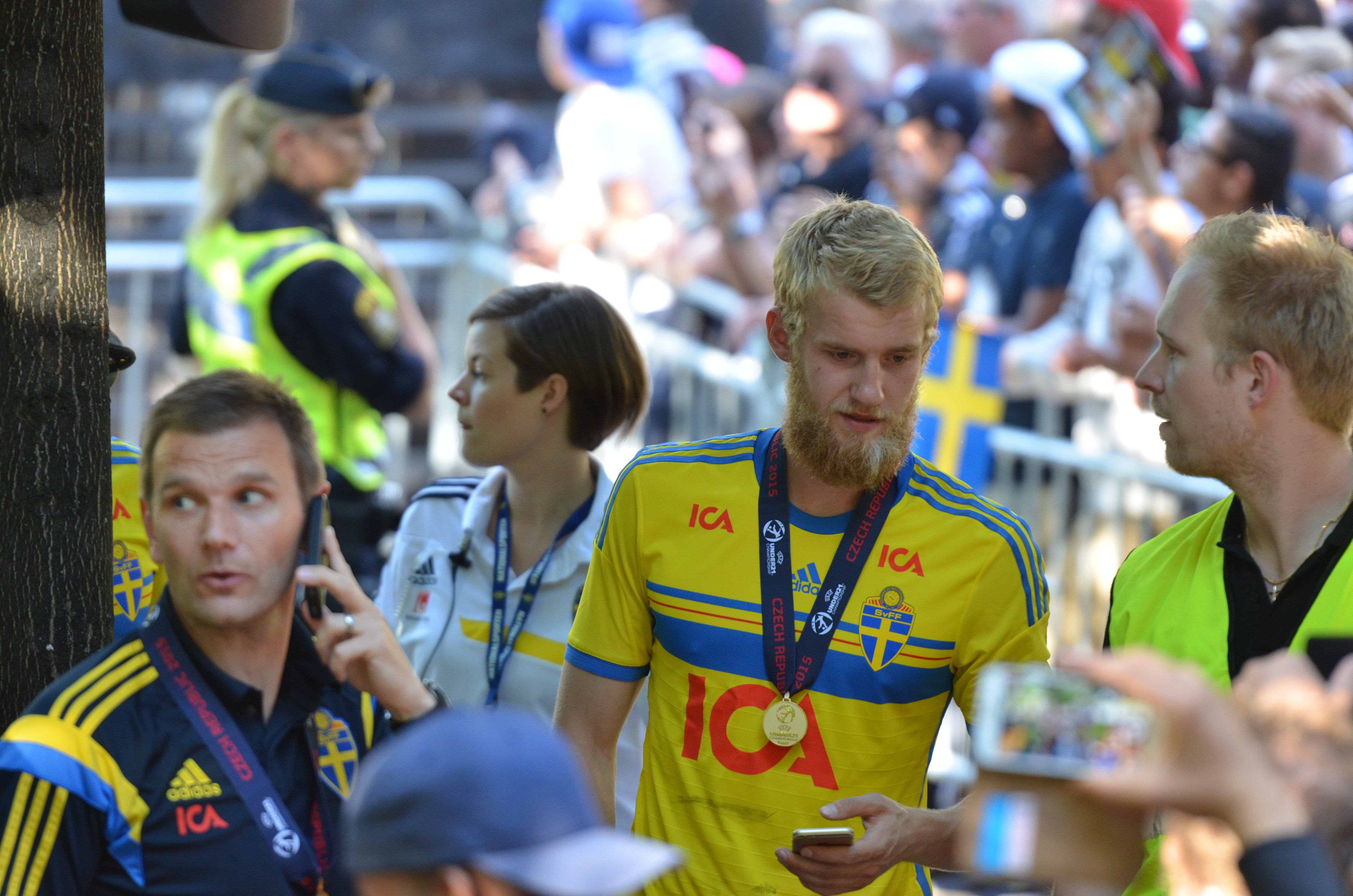 Firande av U21 EM-guldet, efter en bussresa genom Stockholm till Kungsträdgården där det var underhållning och lagpresentation avslutade spelarna med att skriva autografer och ta bilder tillsammans med fans.